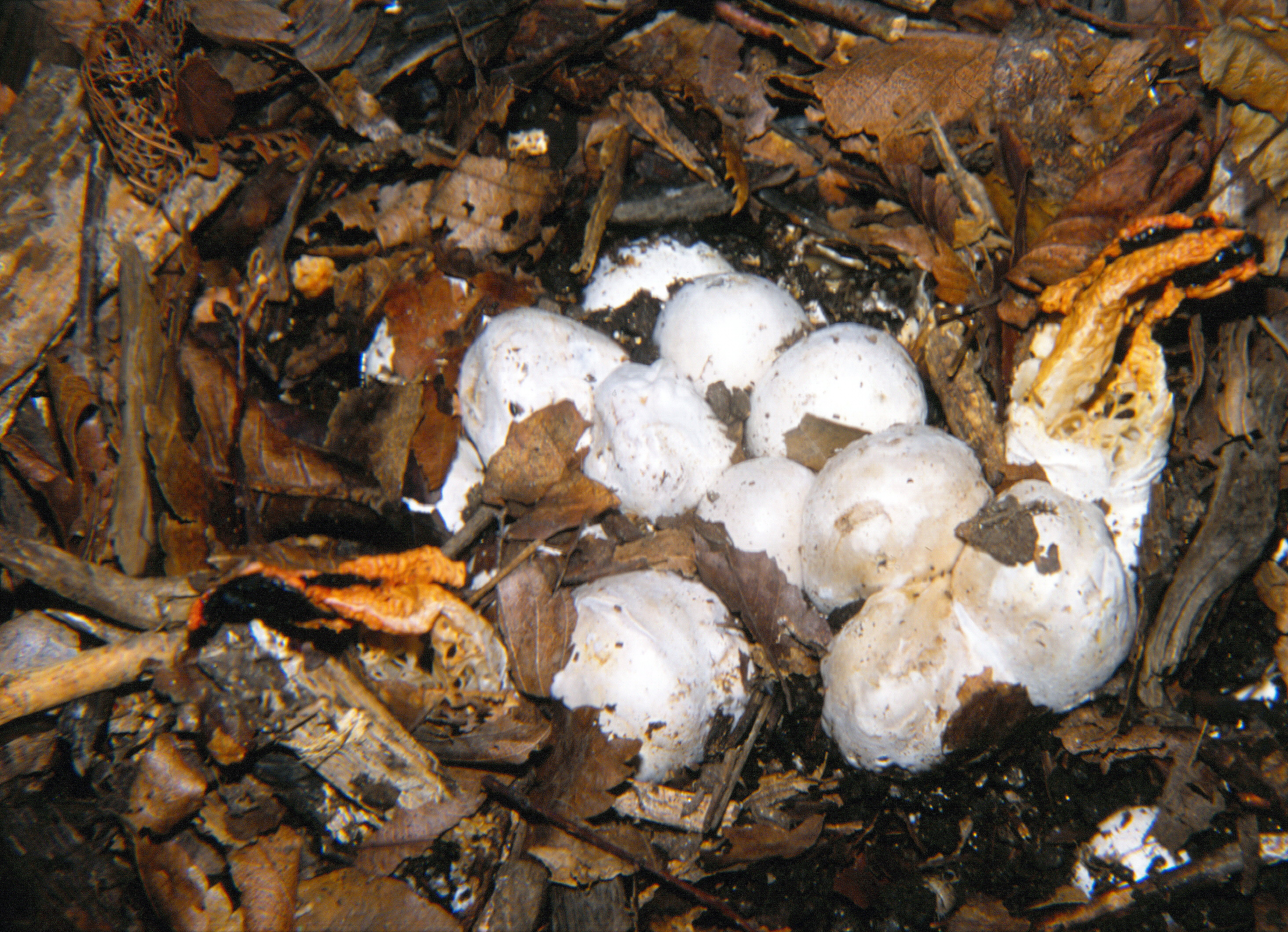 Champignon Gastéromycètes, 9 au stade d’œuf et 1 adulte